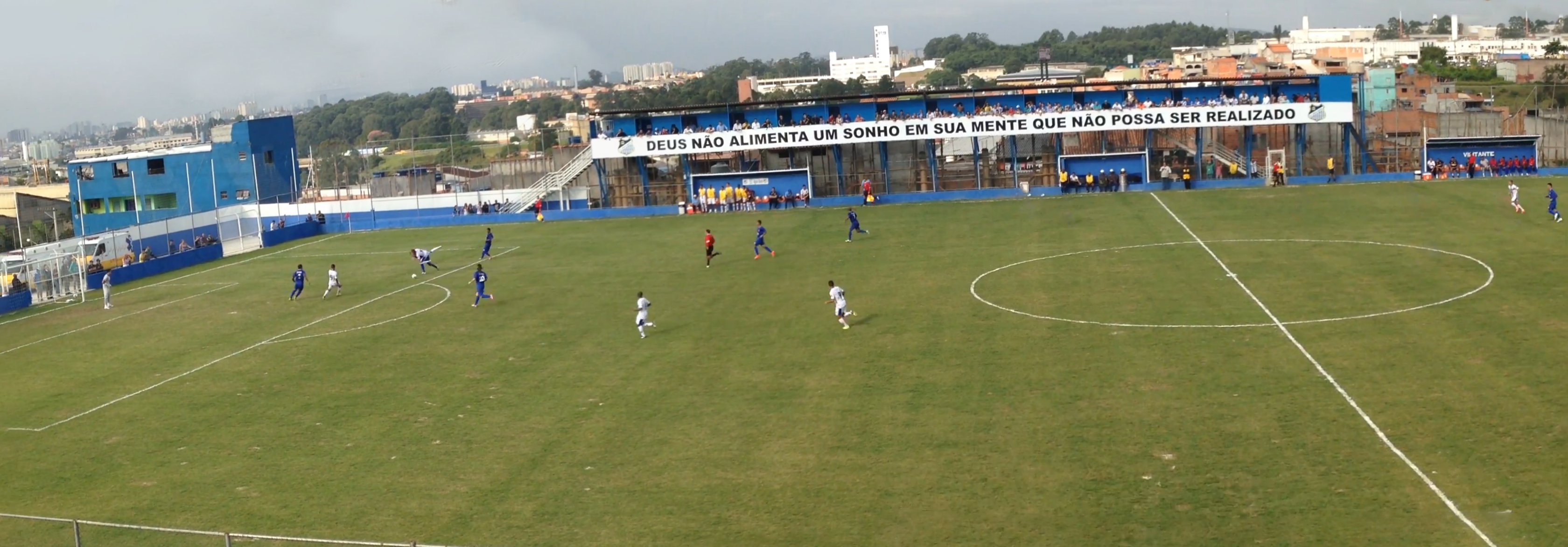 Jogadores de São Caetano e Água Santa em partida no Estádio Distrital do Inamar, em jogo válido pela 15ª rodada do Campeonato Paulista - Série A2 de 2015.